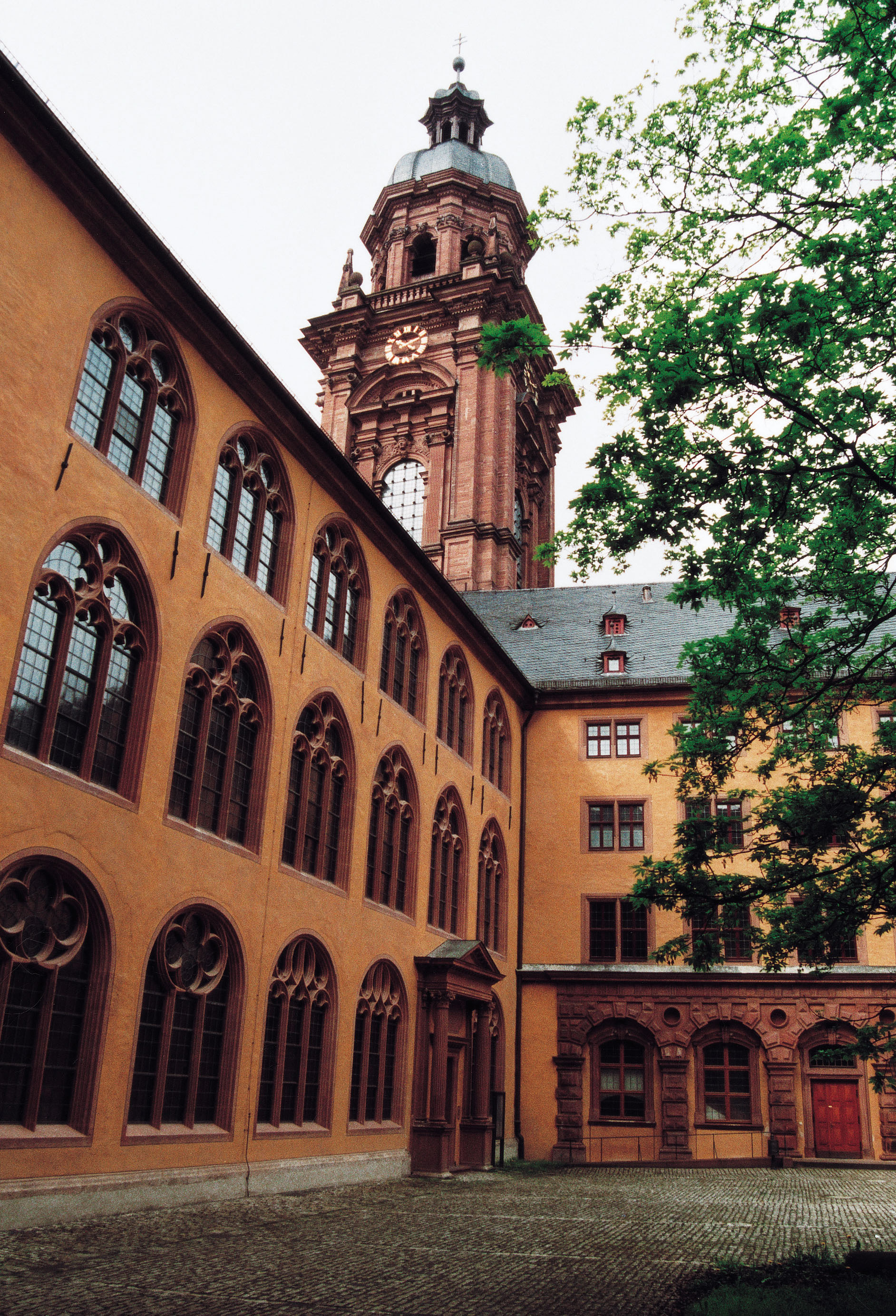 Wuerzburg Old University